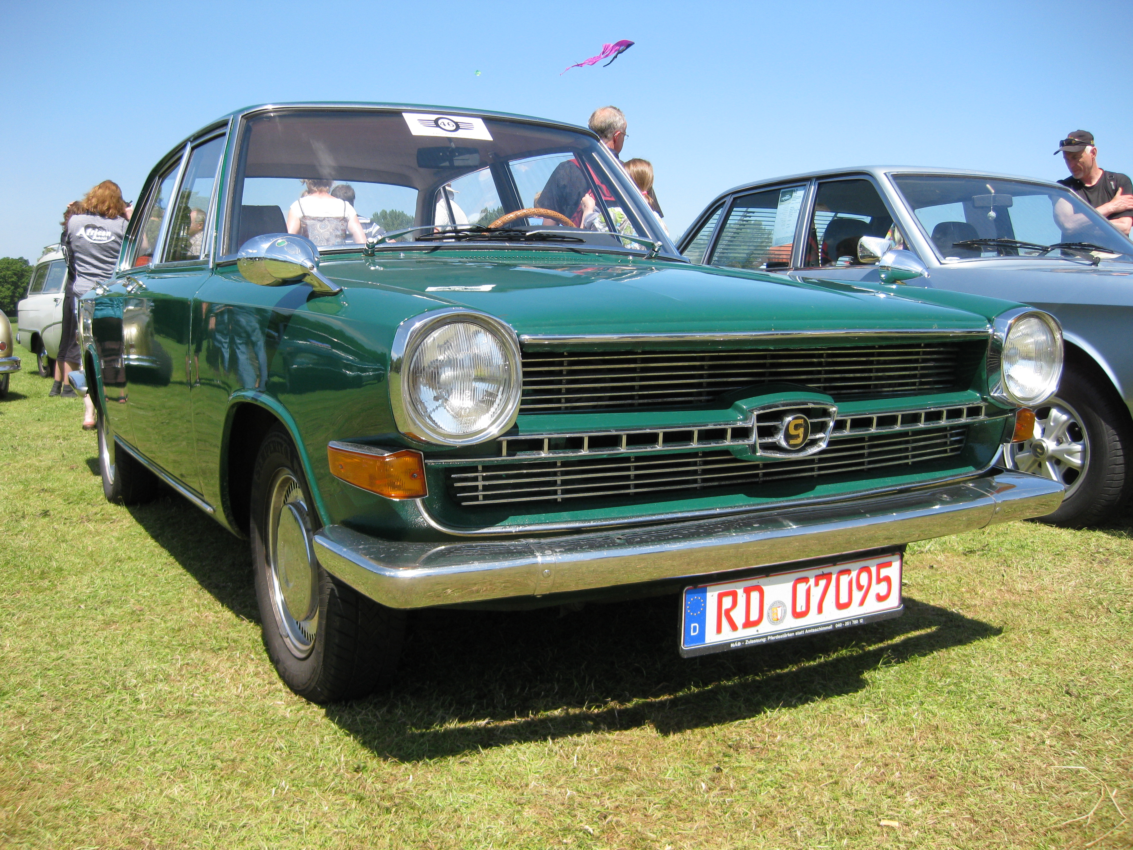 Glas 1700 Frontansicht